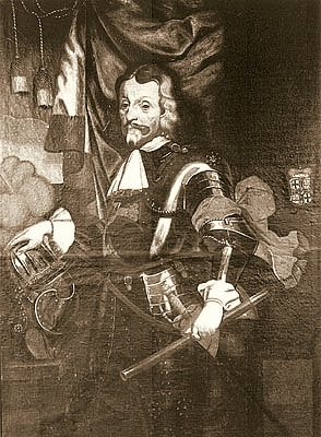 Johann Caspar von Ampringen, Hochmeister Deutscher Orden